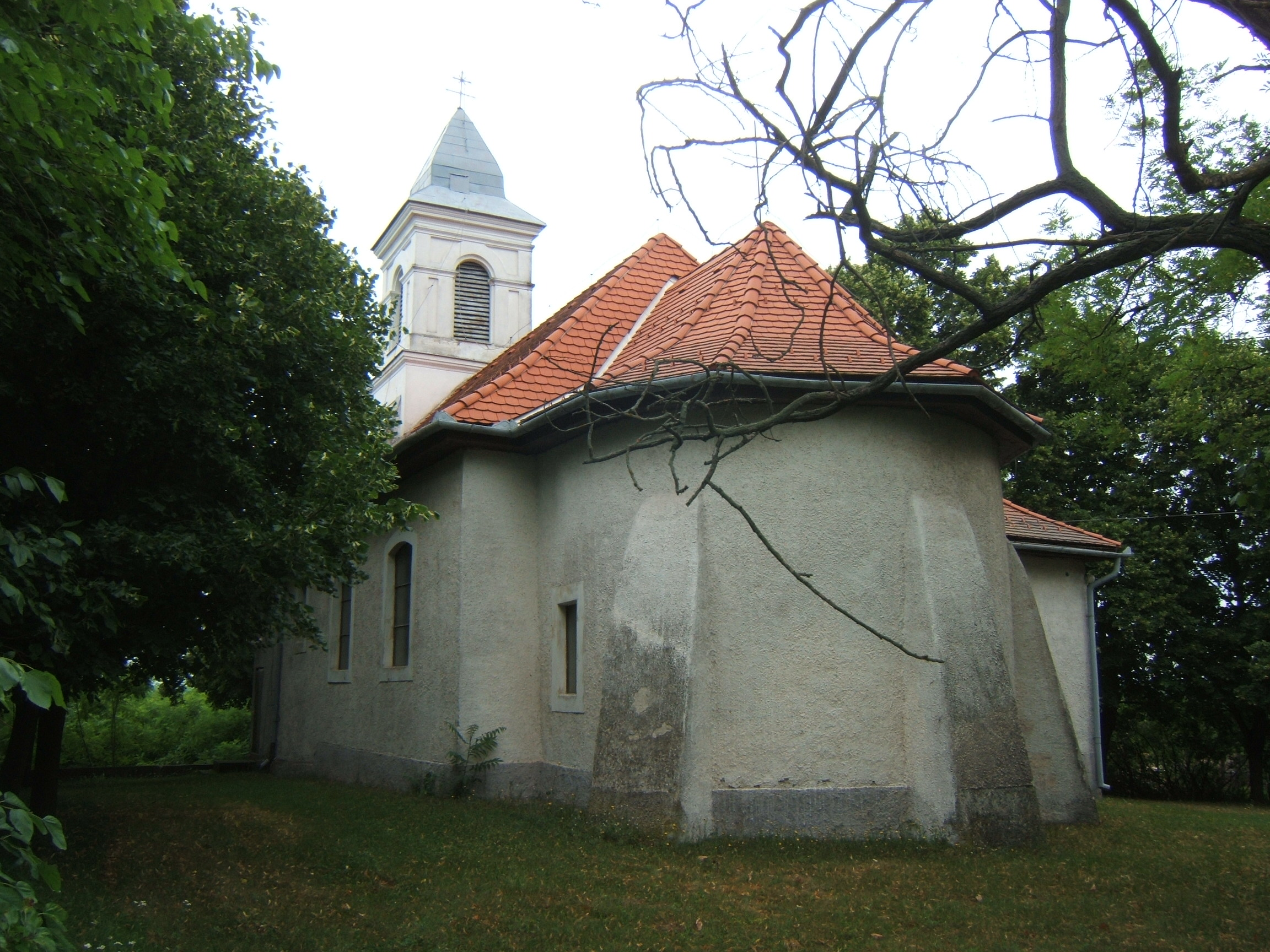 Szőc, templom